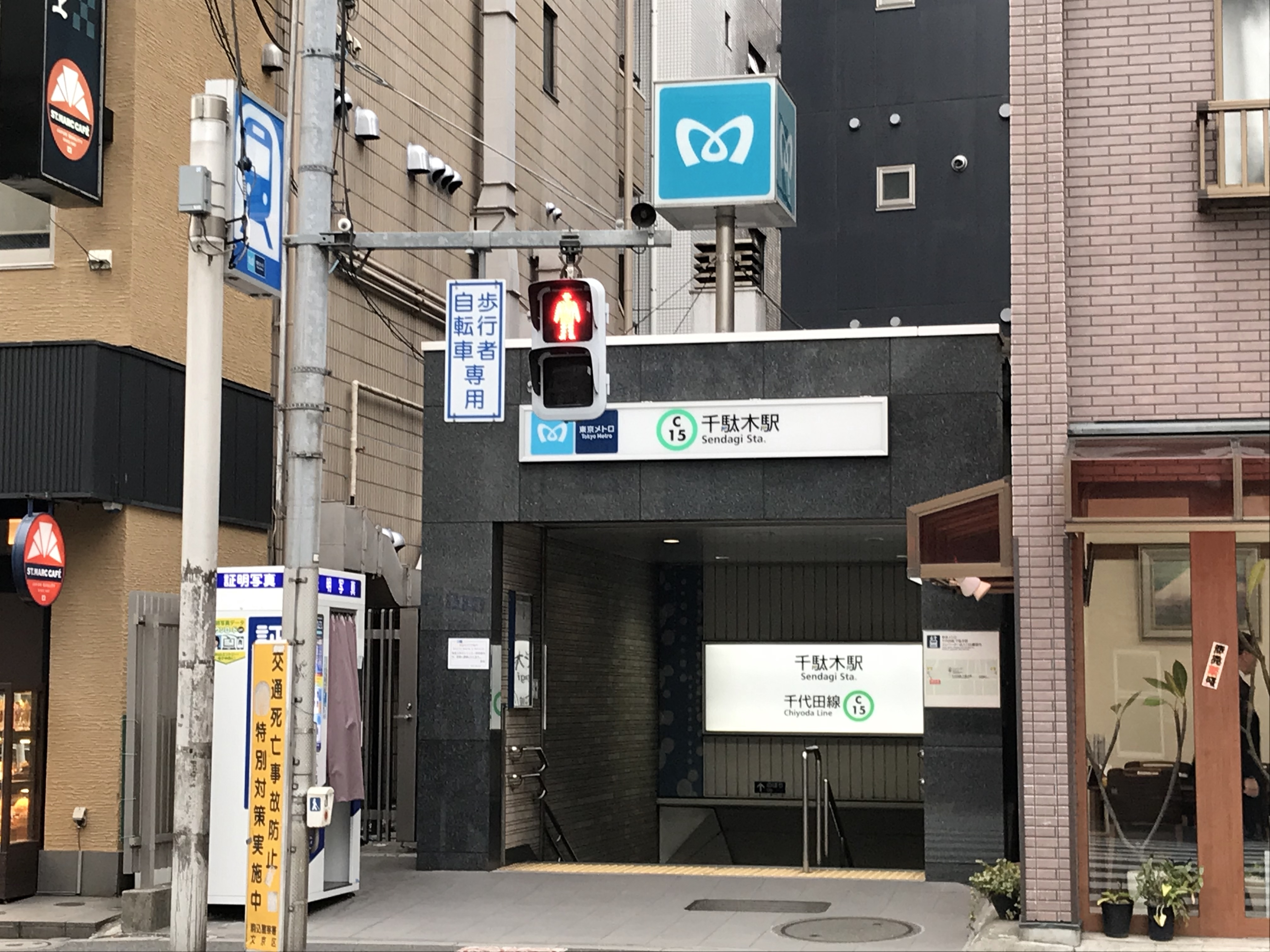 東京メトロ千代田線千駄木駅1番出入口